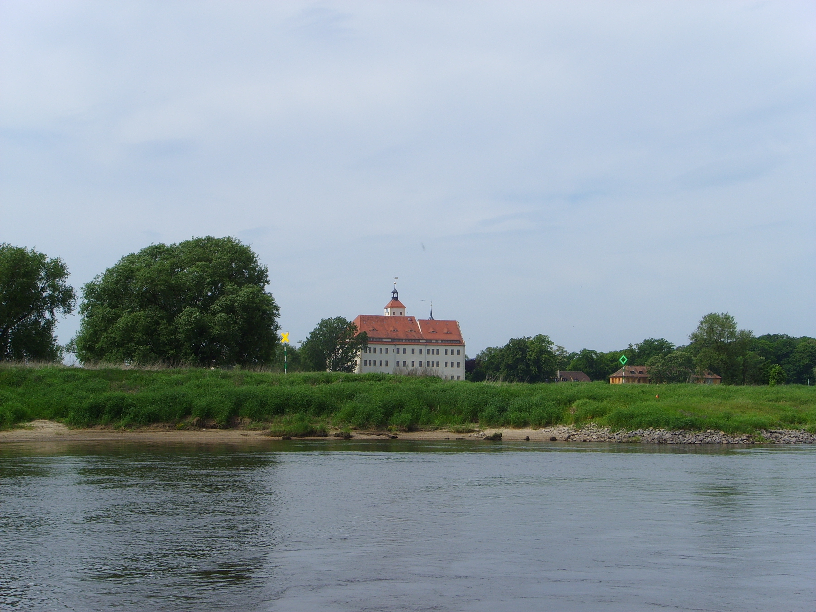 Schloss Pretzsch von der Elbe aus gesehen